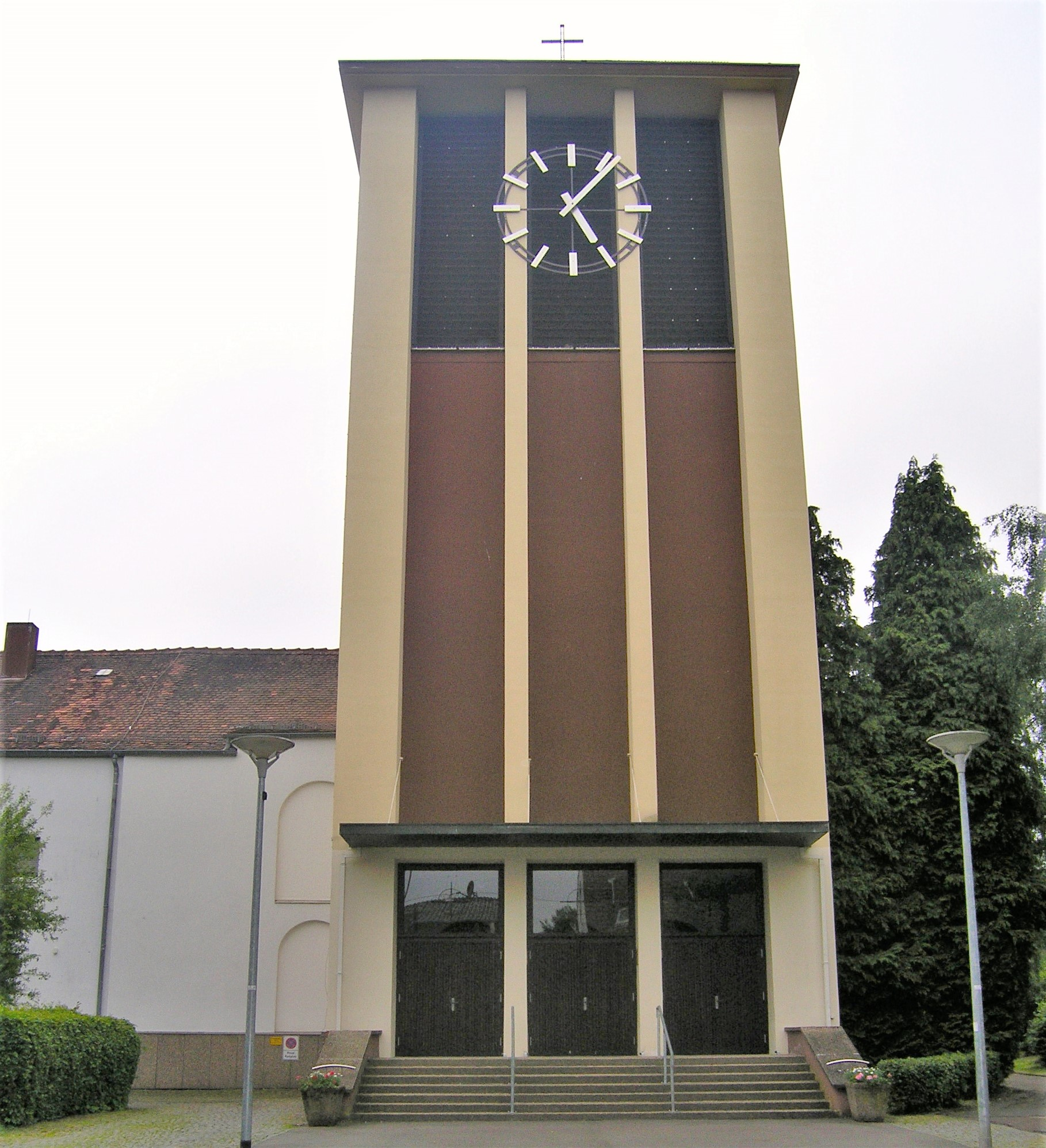 Pfarrhaus und Turm der Kirche St. Anna in St. Wendel-Alsfassen.